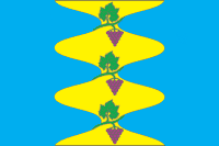 Флаг Сенного сельского поселения, Краснодарский край, Россия.